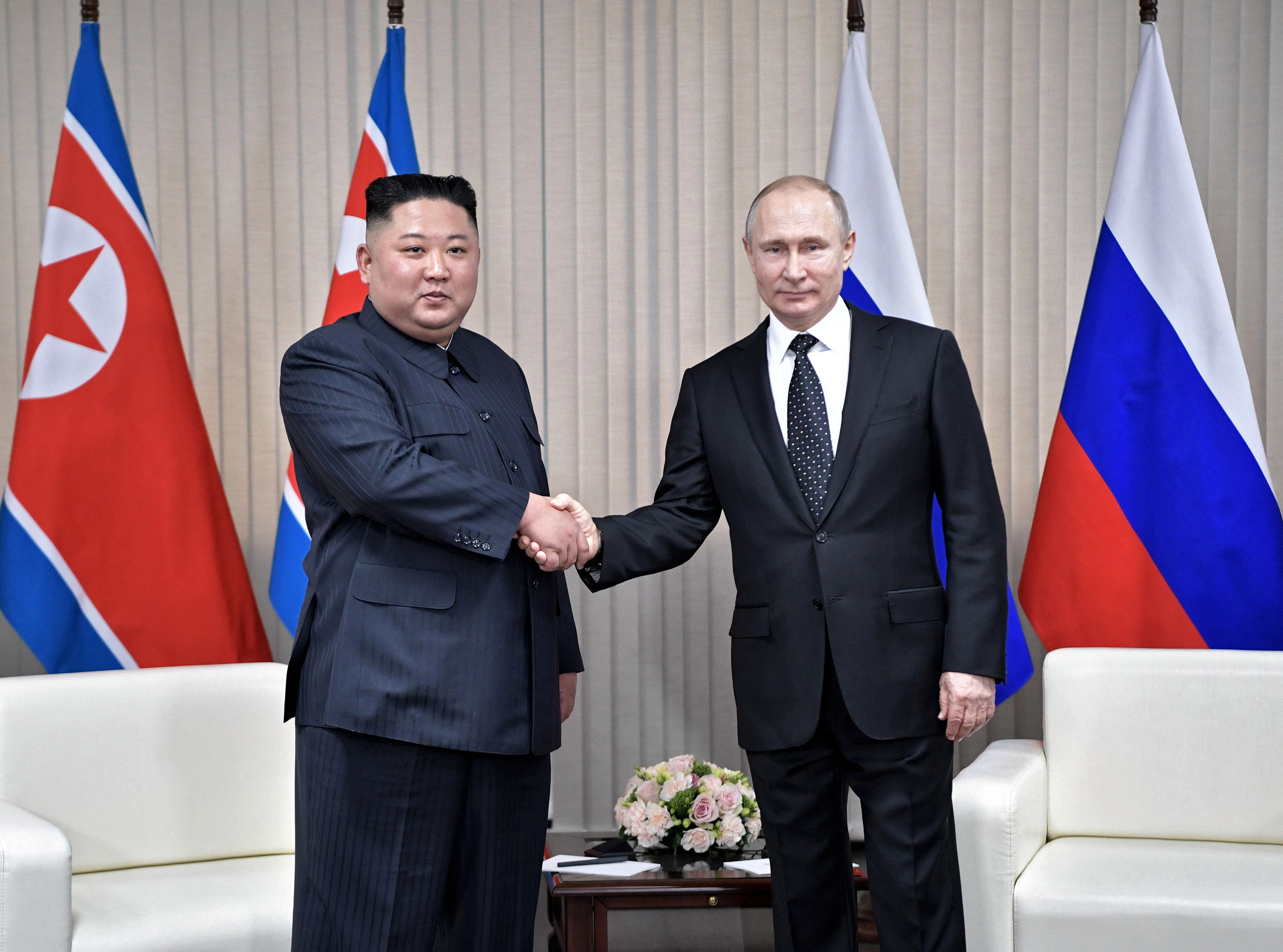 Переговоры Президента Российской Федерации Владимира Путина с Председателем Государственного совета Корейской Народно-Демократической Республики Ким Чен Ыном. Россия, Владивосток, остров Русский.